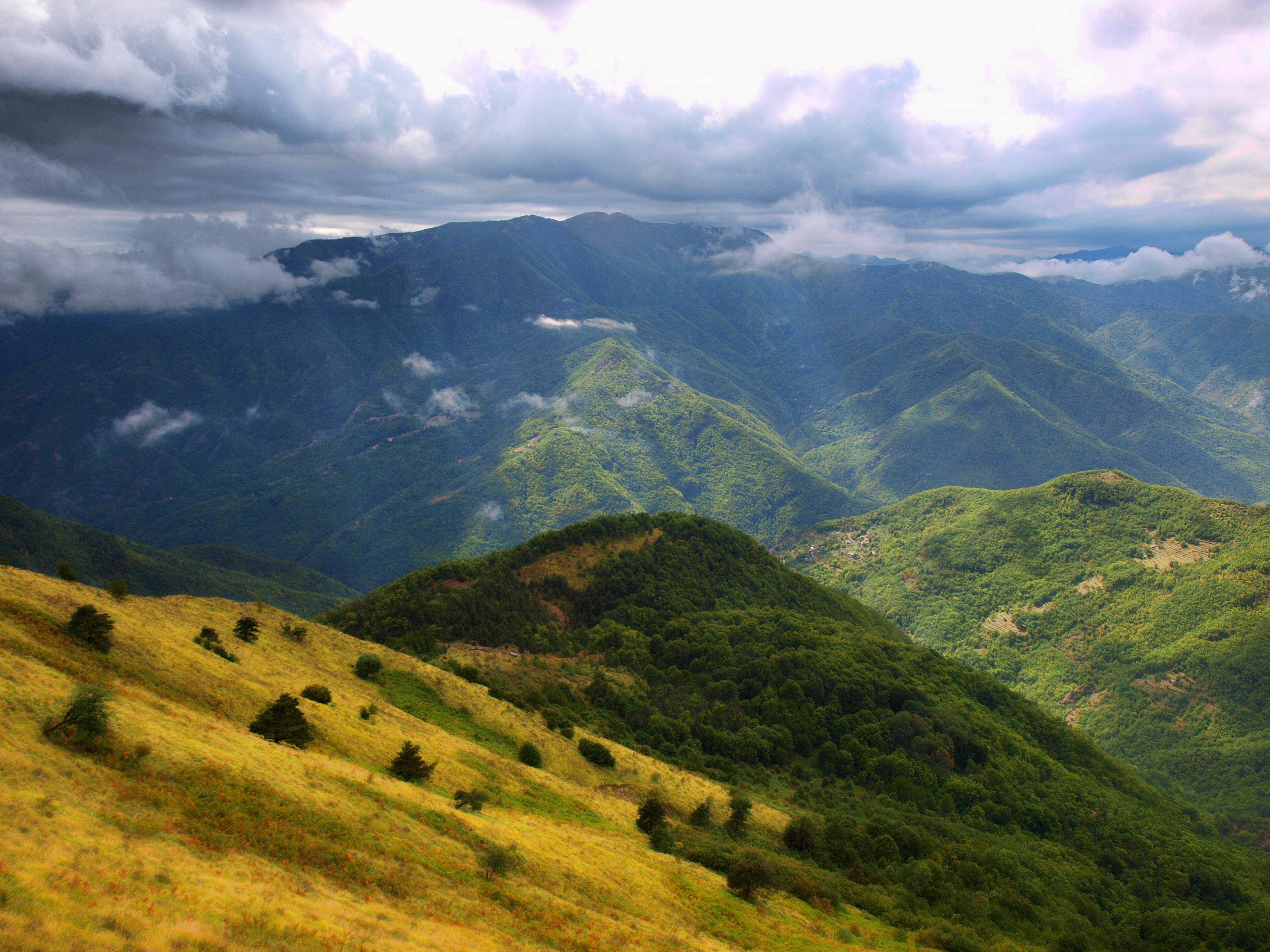 18010 Molini di Triora, Province of Imperia, Italy